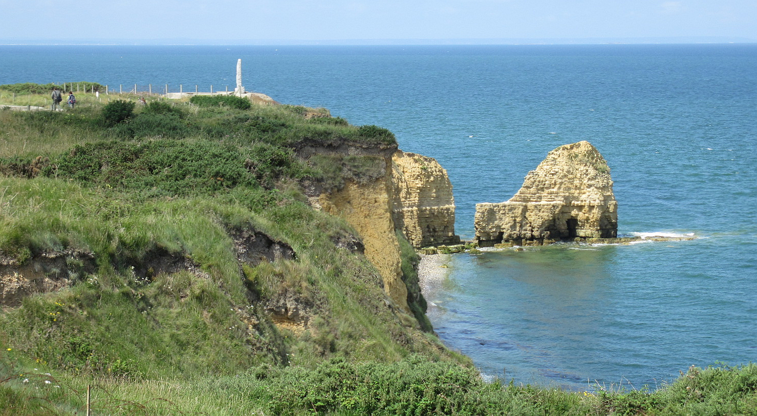 Pointe du Hoc, Août 2009 Nrf: Pouainte du Ho, Août 2009